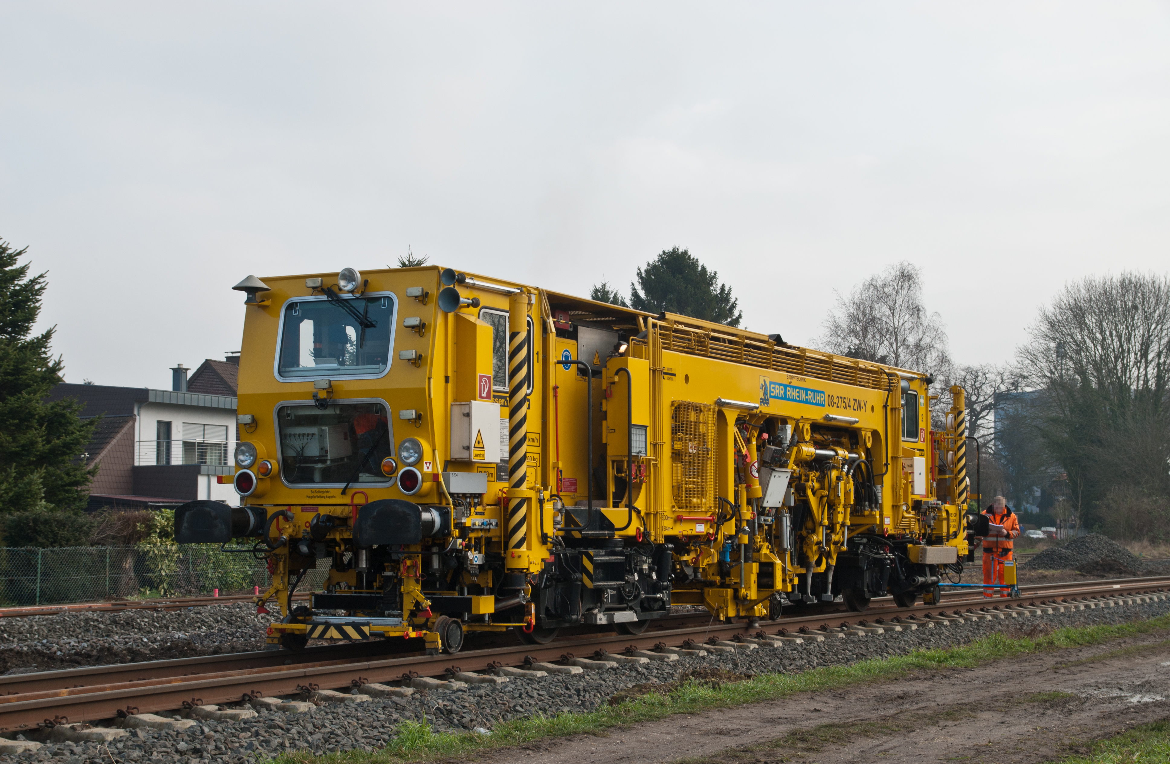 Plasser und Theurer Plassermatic 08-275/4 ZW-Y Gleisstopfmaschine, in Aktion auf der Wurmtalbahn im Bereich des Bahnhofes Oberbruch